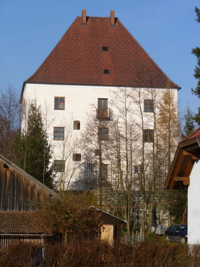 Schloss Raab von Süden Rückseite